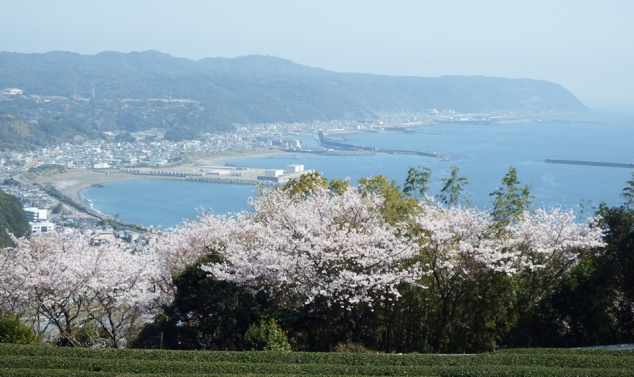 金剛頂寺本坊の桜